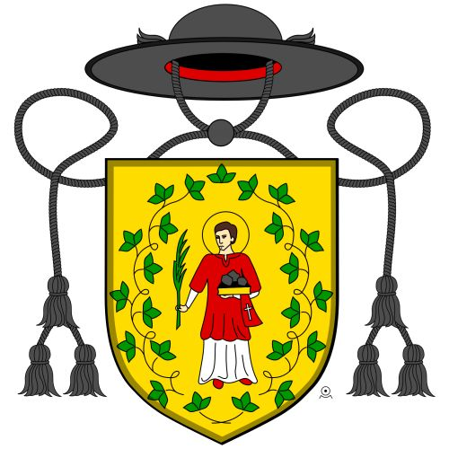 znak kapituly sv. Štěpána v Litoměřicích